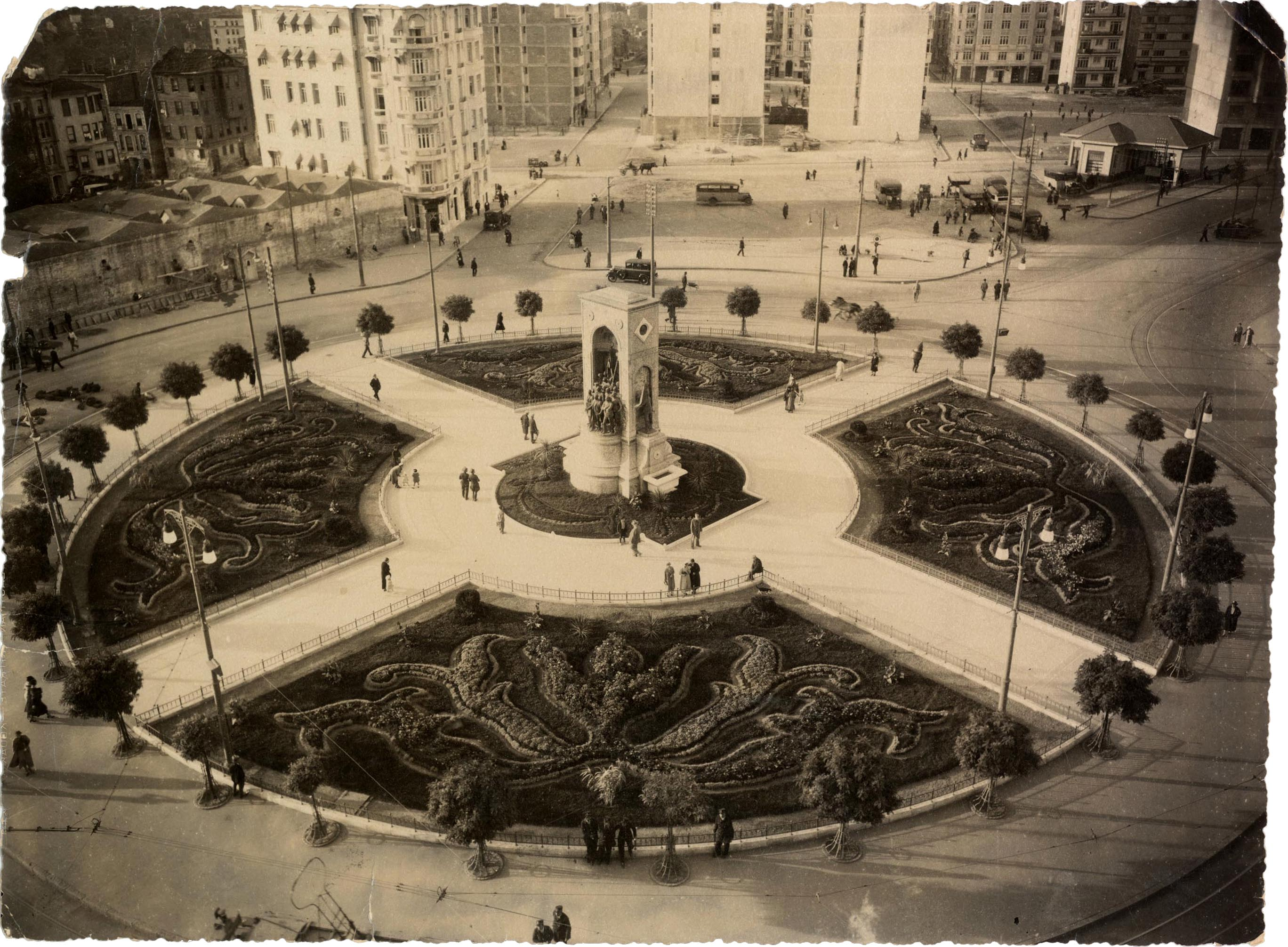 Taksim Republic Monument, 1930s SALT Research, Ali Saim Ülgen Archive Taksim Cumhuriyet Anıtı, 1930’lar SALT Araştırma, Ali Saim Ülgen Arşivi